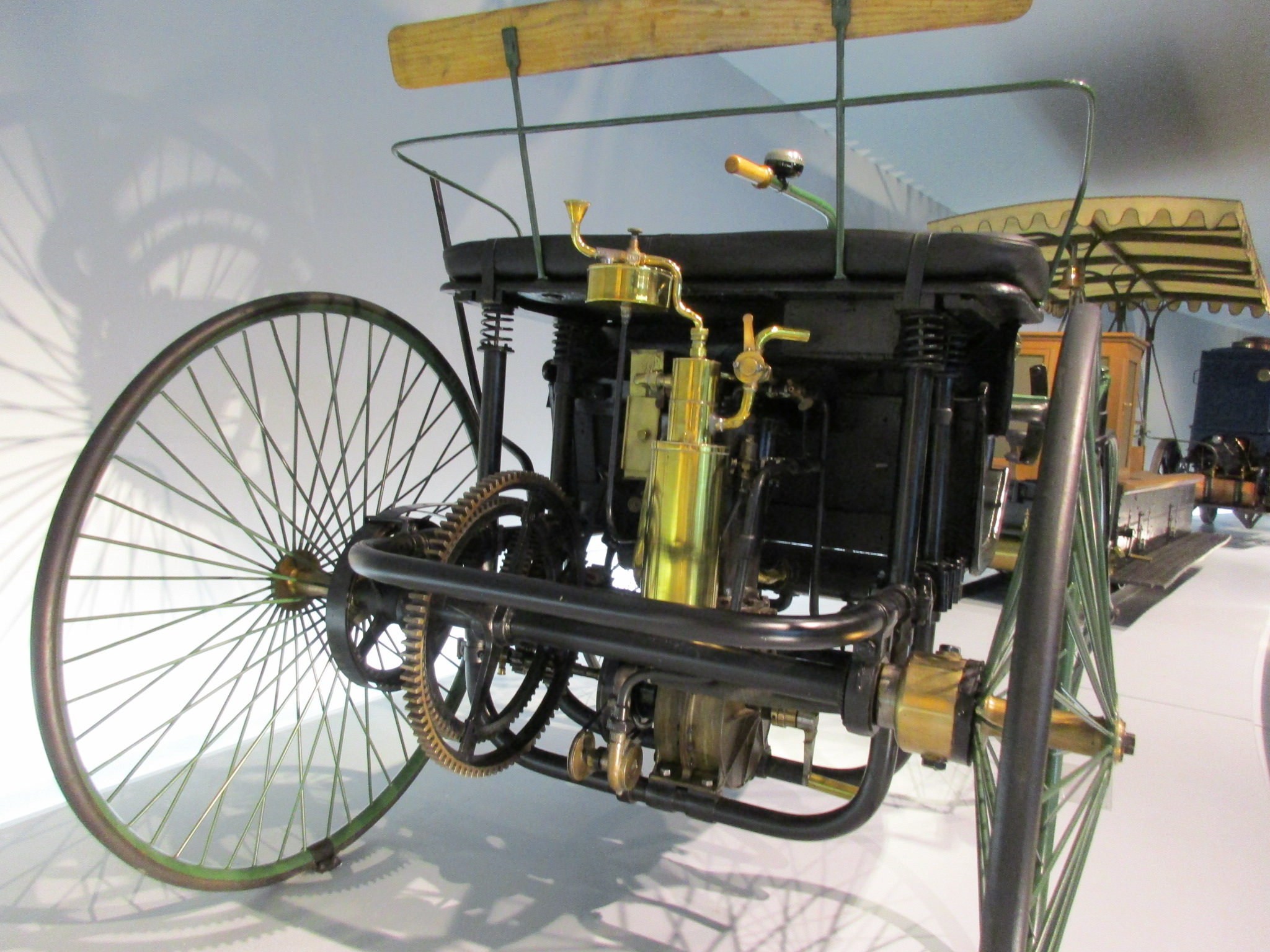 Daimler Stahlradwagen à moteur Daimler V2 Type P, in the Mercedes-Benz-Museum